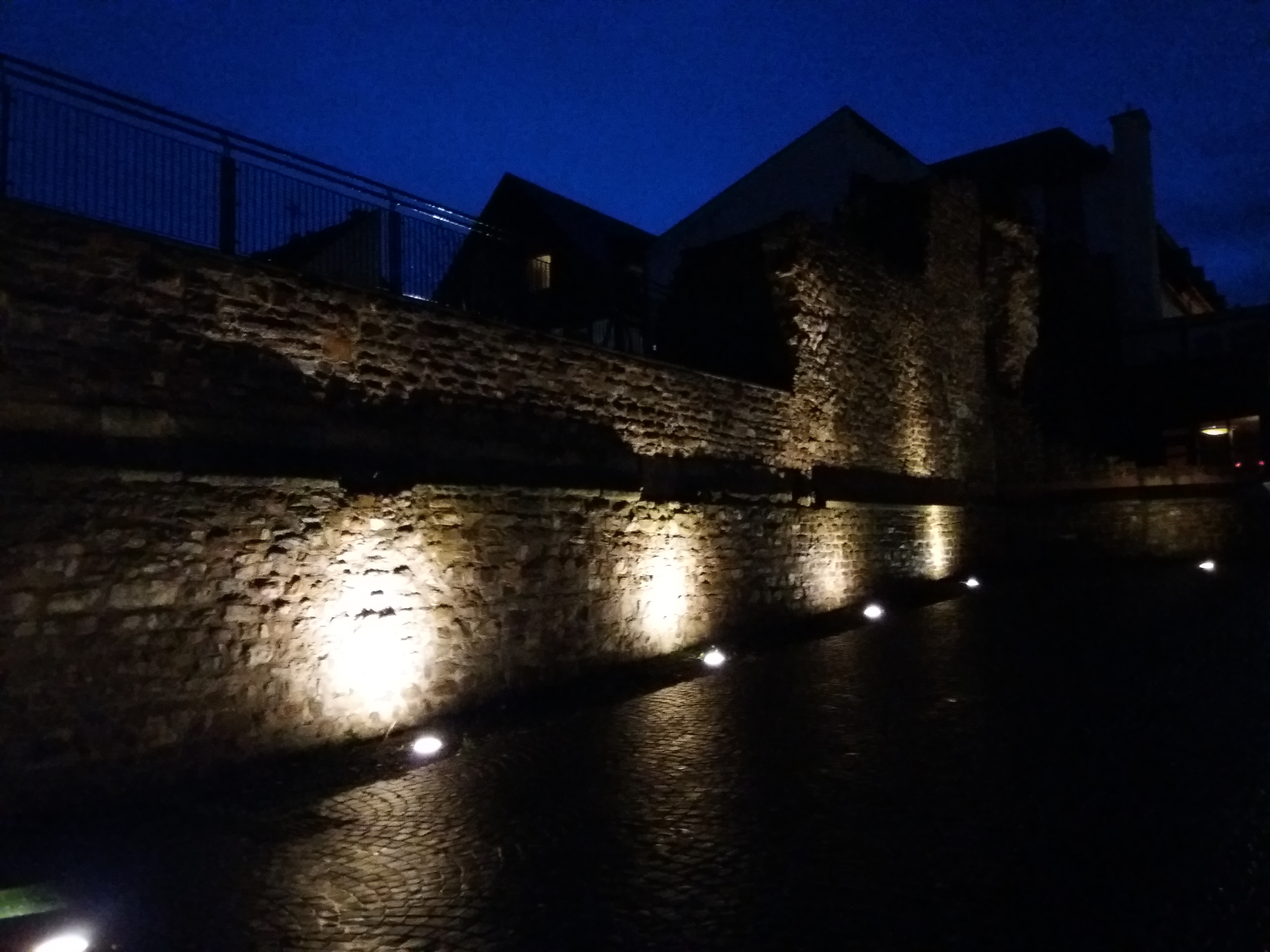 Römische Westmauer bei Nacht